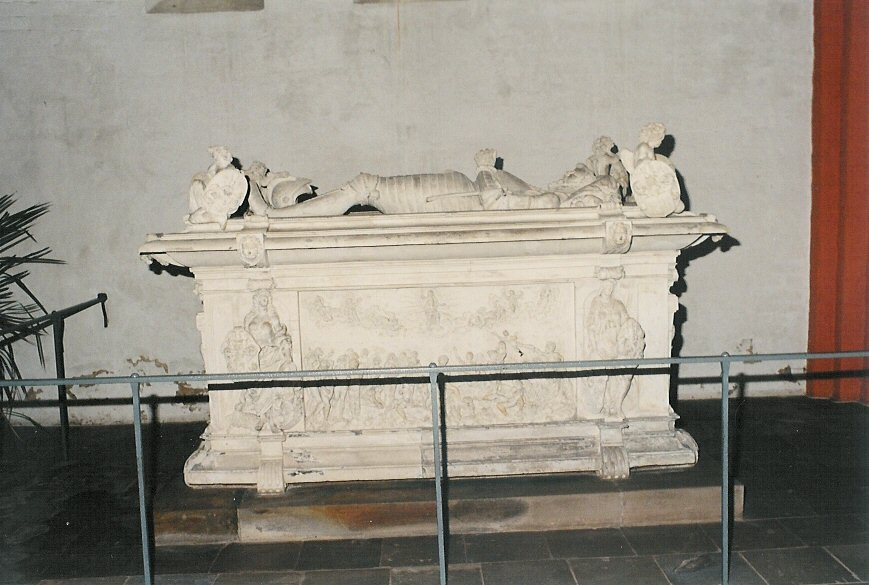 Grabmal des Diepholzer Grafen Friedrich